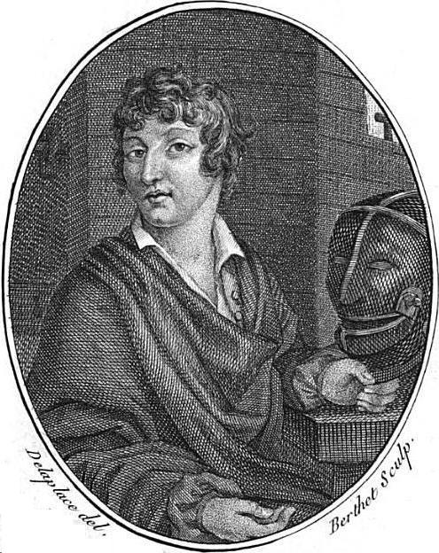 "L'homme au masque de fer, selon M. J.J. Regnault-Warin."